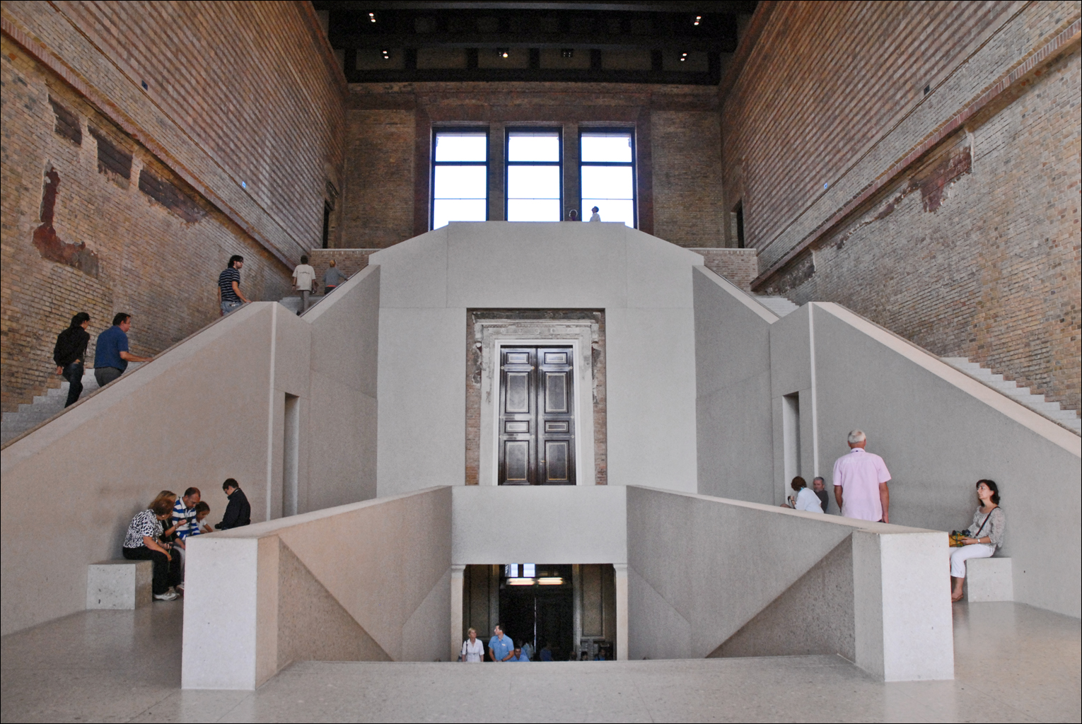 Impressionné par l'expédition de Bonaparte en Egypte, la Prusse, à son tour, s'intéressa de plus en plus à la civilisation égyptienne. Le roi de Prusse fit l'acquisition de plusieurs collections privées. Karl Richard Lepsius organisa une expédition en Egypte entre 1842 et 1845 et rapporta 1500 objets à Berlin, cadeaux de Mehmet-Ali. La collection initiale prit alors une envergure telle que le Roi Frédéric Guillaume IV confia à l'architecte Stüler, un élève de F. Schinkel, la construction en 1850 d'un "Nouveau Musée", Neues Museum, destiné à accueillir les différentes collections. Le "nouveau musée", fermé en 1939, a subi de gros dommages à la suite des bombardements de Berlin en 1944 et sa réouverture n'a été effective qu'en octobre 2009 à l'issue d'une longue restauration conduite par l'architecte anglais David Chipperfield. Les péripéties de la seconde guerre mondiale et de la guerre froide ont conduit à un partage de la collection égyptienne. Une partie des collections égyptiennes (comprenant les objets des fouilles d'Amarna) a été présentée durant plusieurs années à l'ouest dans le musée égyptien près du château de Charlottenburg. La Russie, qui a rendu à l'Allemagne, les collections égyptiennes emportées pendant la guerre, a néanmoins gardé sur son sol une importante partie des objets pré ou protohistoriques, dont des parties du Trésor de Priam. Le hall d'entrée du musée était orné en 1900 de fresques représentant les différentes étapes de l'histoire du monde de Wilh em von Kaulbach. En haut de l'escalier, se trouvait une copie du porche des Cariatides de l'Acropole d'Athènes. Site du musée